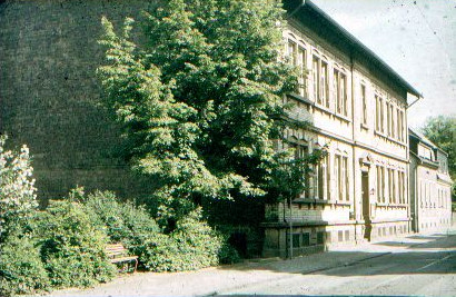 Jugenzentrum St. Ingbert